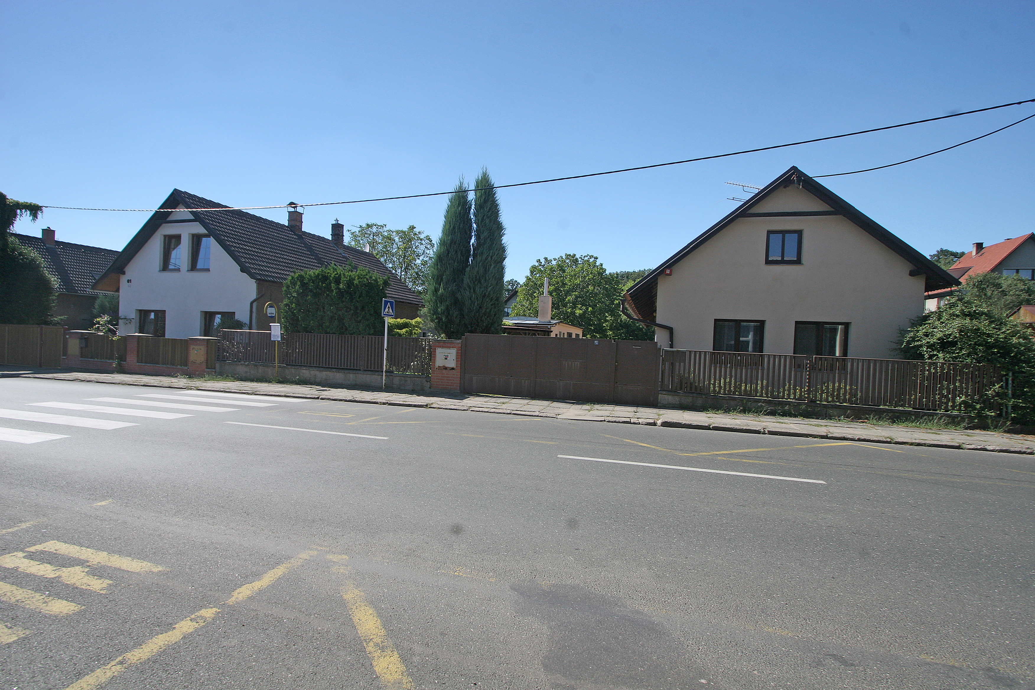 Olešnice čp. 64